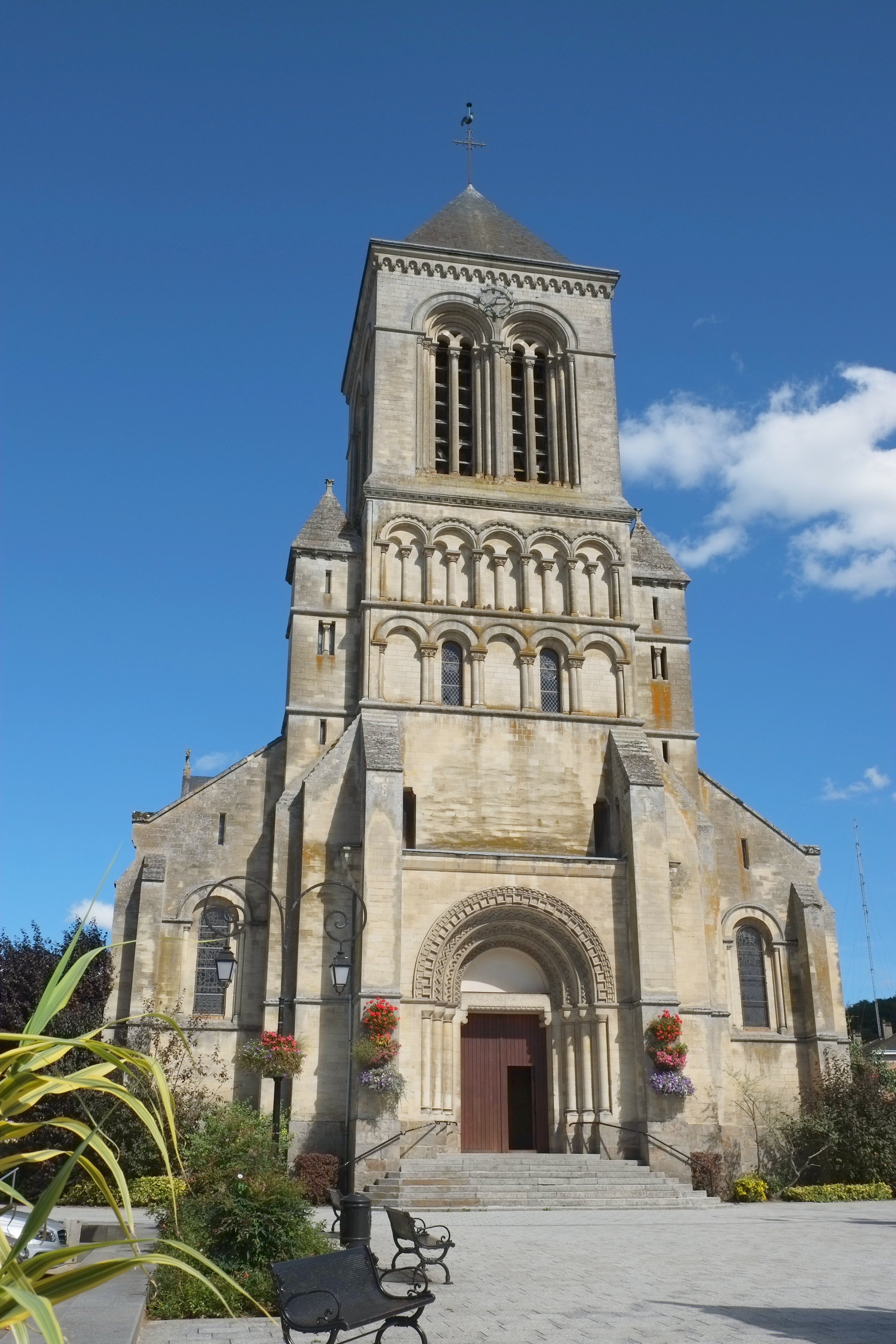 Kirche Saint-Saëns in Saint-Saëns im Département Seine-Maritime (Frankreich)